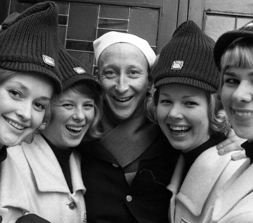 Beskrivelse: VM-vertinner i følge med skuespiller Ulf Wenngaard Sted: Oslo År: 1966 Fotograf: Billedbladet NÅ/ van Deurs Arkivref.: RIKSARKIVET- RA/PA-0797/U/Ua/3899_4_42